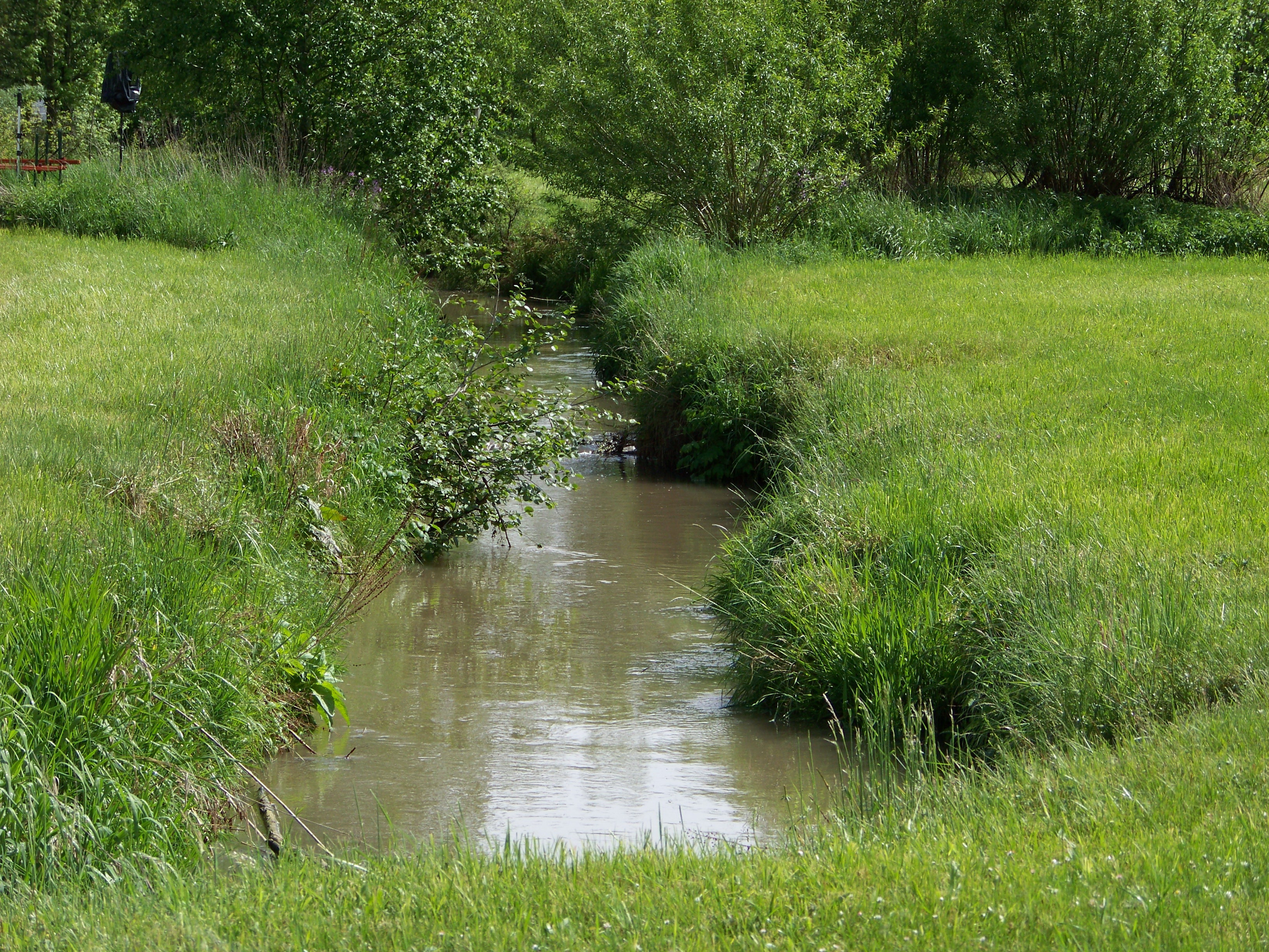 Laberweinting, Hofkirchen. Der Bayerbacher Bach westlich von Hofkirchen.